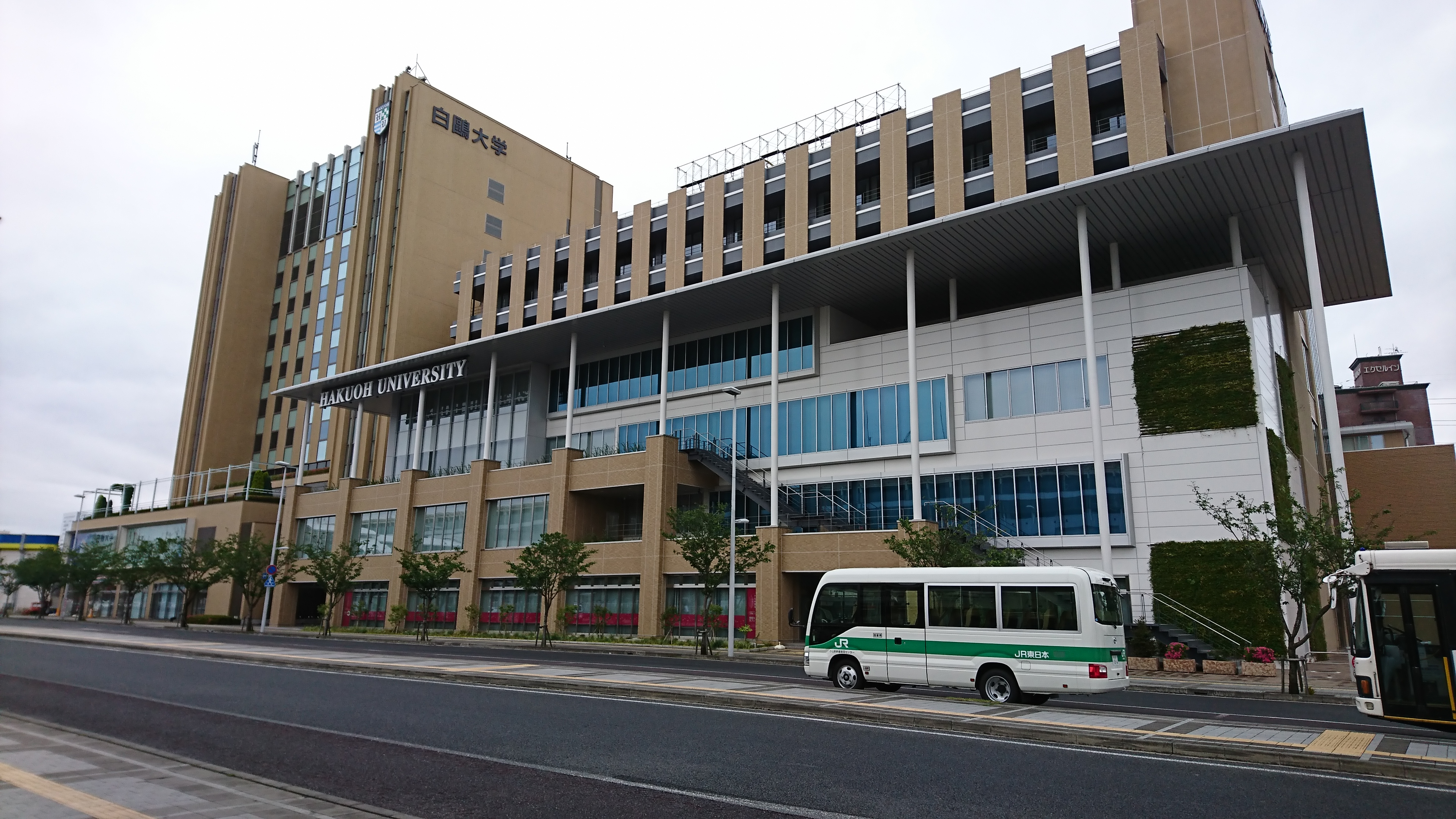 白鷗大学本キャンパス（2020年5月20日撮影）